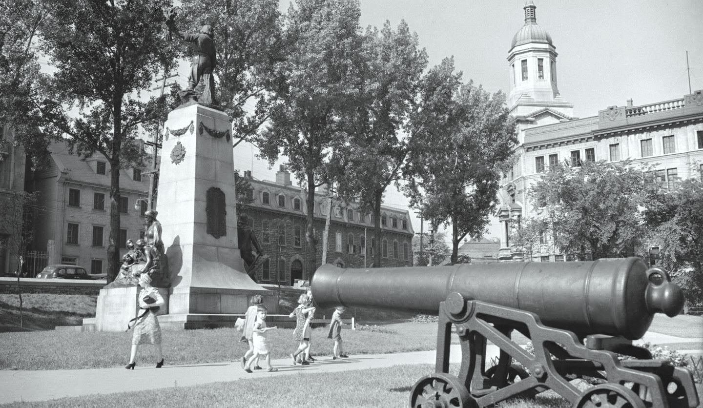 Le monument de Louis Hébert à Québec en 1941 « Par une chaude journée ensoleillée, une dame et des enfants traversent le jardin de l’hôtel de ville. Le petit garçon jette un regard curieux vers le cinéaste et photographe Herménégilde Lavoie, qui utilise le canon pour diriger le regard vers le monument de Louis Hébert. Dévoilés le 3 septembre 1918, les bronzes du sculpteur montréalais Alfred Laliberté commémorent le tricentenaire de l’arrivée de Louis Hébert en 1617. Debout au sommet du monument, l’homme est accompagné de son épouse, Marie Rollet, assise au milieu de ses trois enfants et de son gendre, le défricheur Guillaume Couillard, dans l’ombre sur la photo. Des festons, les armoiries de la ville, de la province et de Guillaume Couillard ainsi qu’une plaque portant les noms des 47 premiers colons de Québec décorent le piédestal. Le dôme du pavillon des Sciences commerciales domine le paysage depuis 1928. Construit dans le style Beaux-Arts, il relie les ailes des rues Sainte-Anne et Pierre-Olivier-Chauveau de l’Académie commerciale fondée par les Frères des écoles chrétiennes en 1862. Le dôme sera détruit par l’incendie de 1961 et ce jardin disparaîtra en 1971. » – Marc Beaudoin, Société historique de Québec